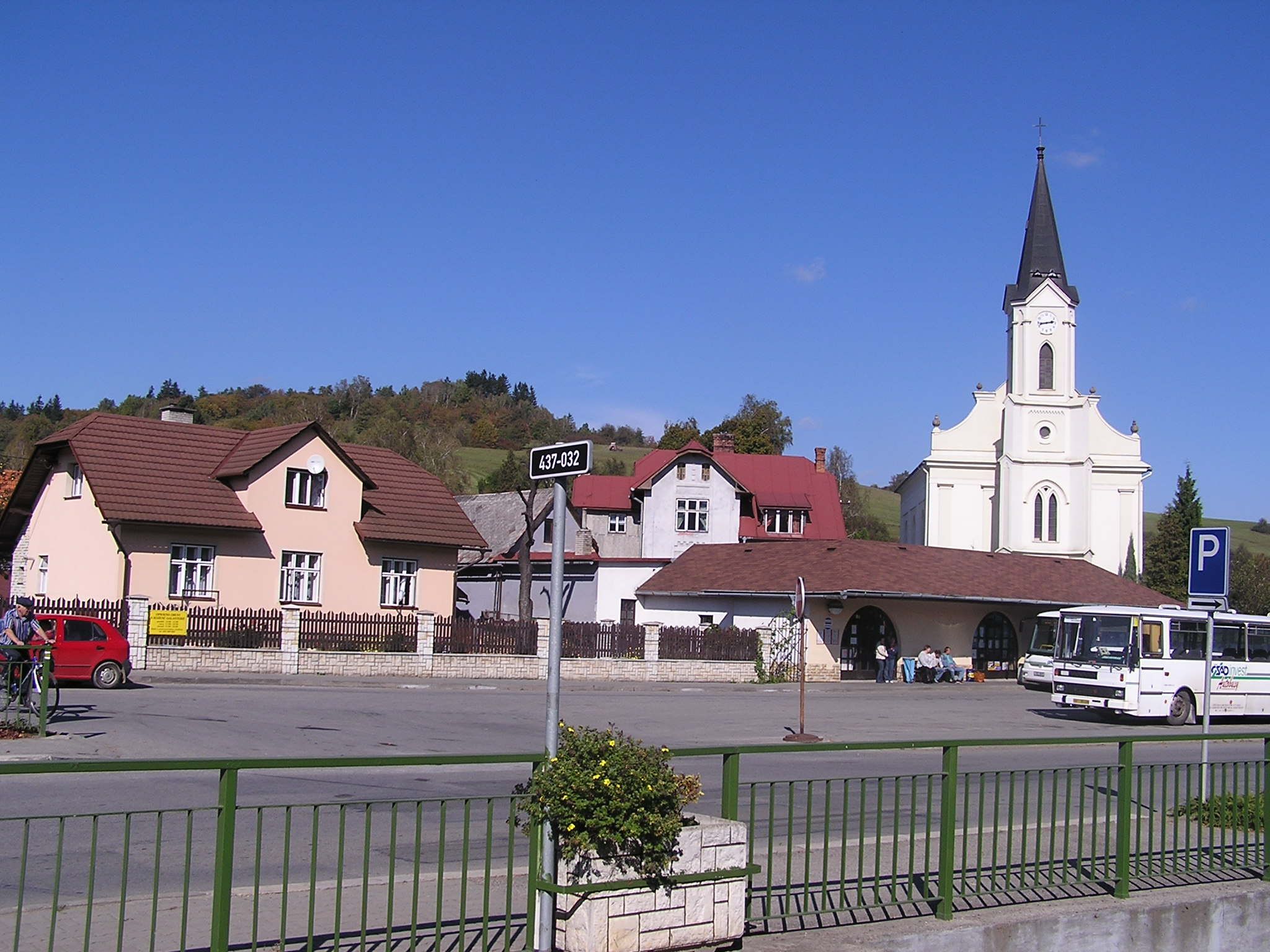 Náves v Hošťálkové